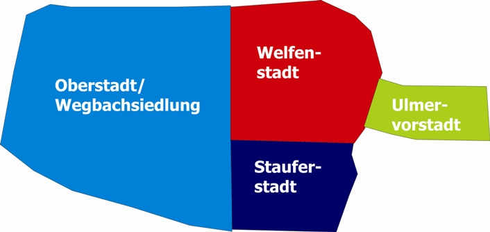 Die Stadtteile Memmingens im ausgehenden Mittelalter bzw. die Gründungen der einzelnen Stadtteile